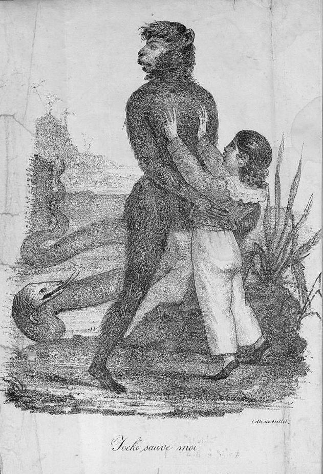 „Jocko sauve moi“ (Jocko rette mich). Szene aus „Jocko ou le Singe du Brésil“. Fernand bittet Jocko, ihn vor der Schlange zu retten.